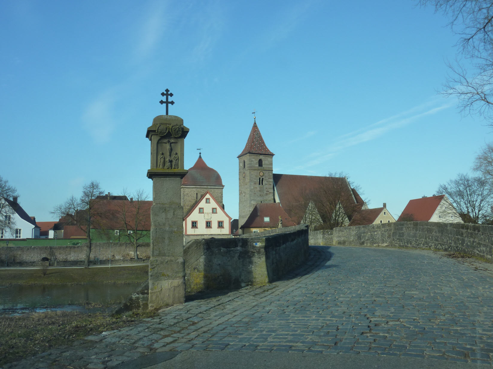 Altmühlbrücke in Ornbau